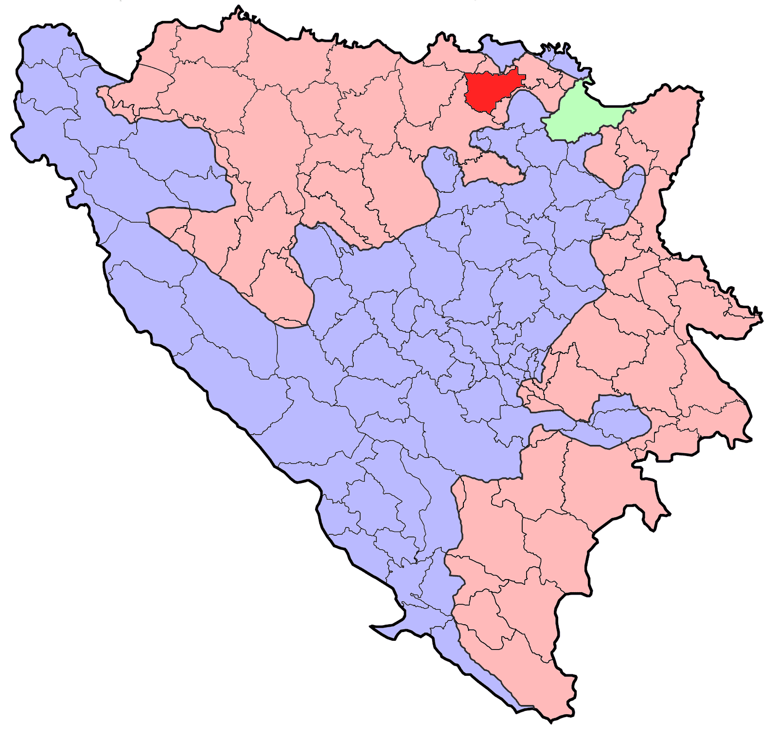 Republika Srpska (BiH) municipality